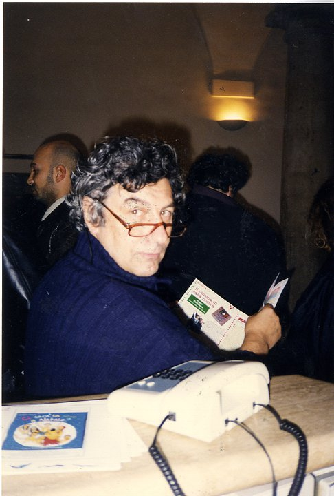 Stelio nelle sue funzioni di Direttore della Multisala